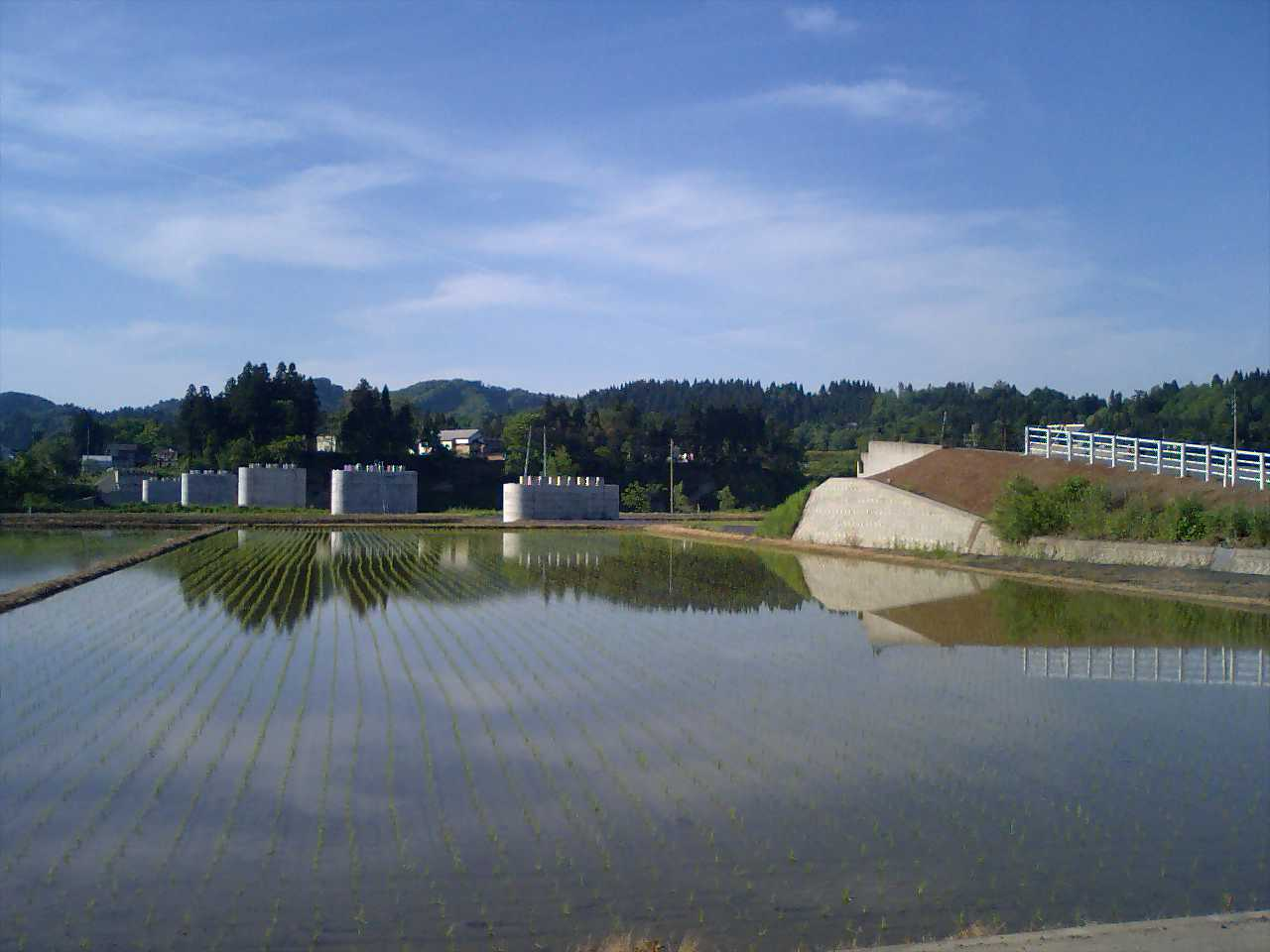 この画像は2007年5月21日投稿者によって、新潟県北魚沼郡川口町西川口(現在は新潟県長岡市西川口西倉)にて撮影された、建設中で橋脚と橋台だけの姿の牛ケ島大橋の写真。